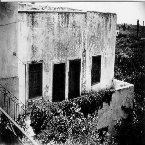 בית אנטון - איוב בין פרדסי יפו - אכסנייתם של הבילויים, ( תרמ"ב, 1882) .